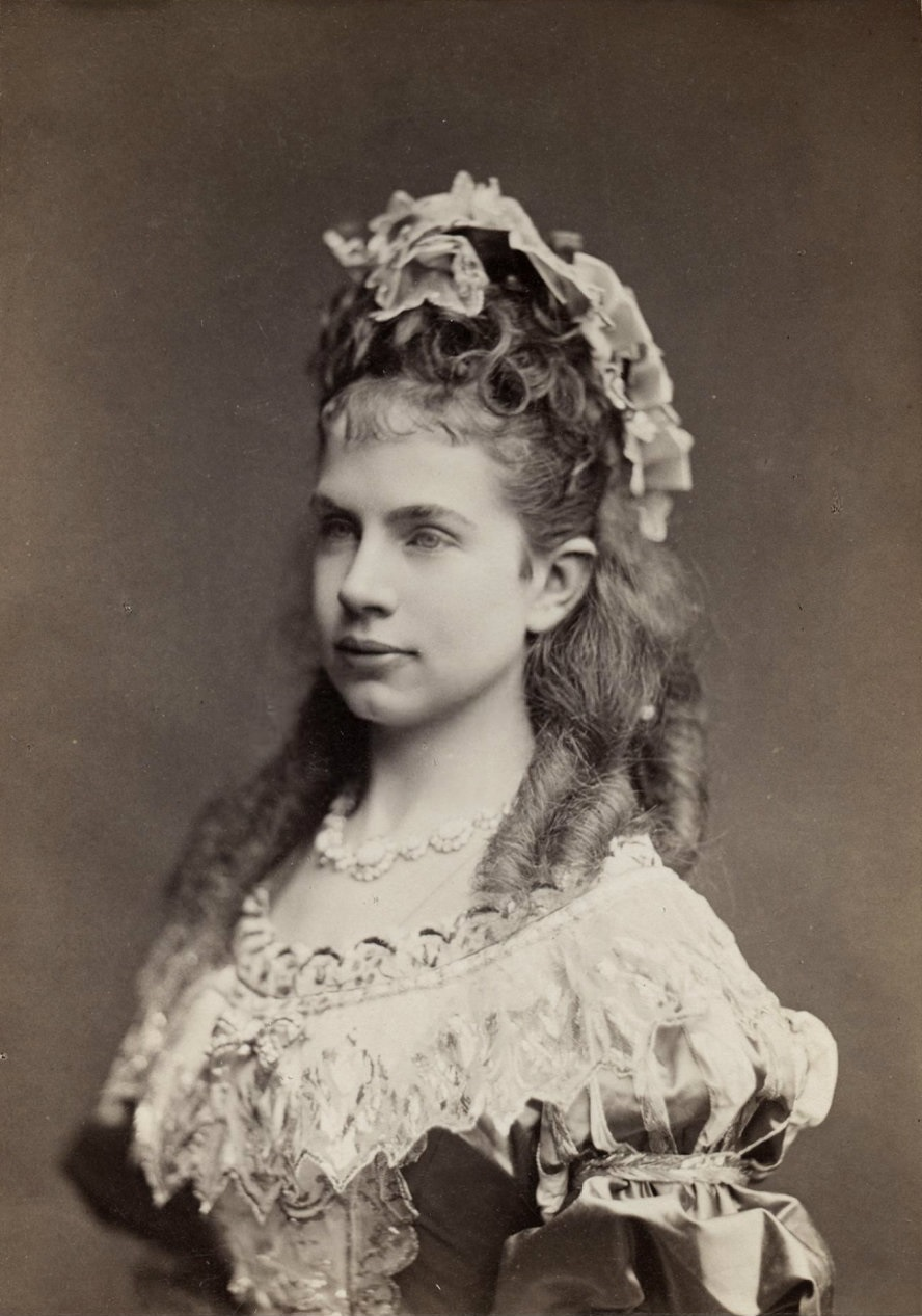 Gisela Louise Marie Erzherzogin von Österreich, Prinzessin von Bayern. Bildnis in historischem Festkleid. Ausschnitt, Brustbild.